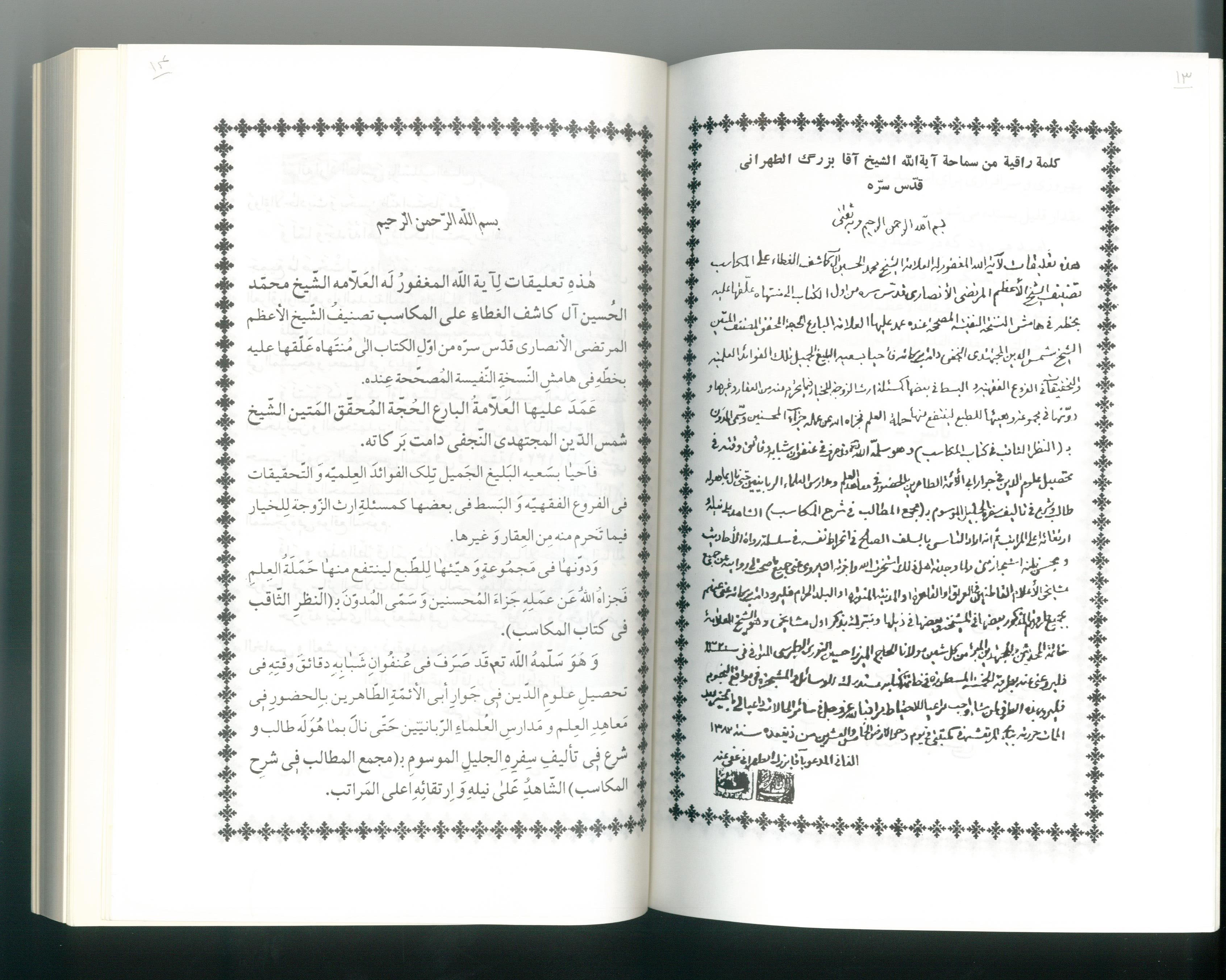 دست نوشتۀ آقابزرگ تهرانی